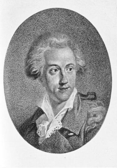 August Friedrich Ferdinand von Kotzebue (1761-1819) Ölgemälde von J. C. Heinsius, Landesbibliothelk Weimar.Sein Charakter war Goethe nicht minder unsympathisch, was ihn als Theaterleiter nicht hinderte, während der sechsundzwanzig Jahre seiner Theaterleitung fast ein Sechstel aller Theaterabende mit Kotzebues Stücken zu besetzen. Kotzebues Versuche Goethe und Schiller zu entzweien durch eine betonte Schillerfeier (1802) wurden vereitelt. In Verbindung mit G.H.Merkel gab Kotzebue 1803-1806 die Zeitschrift "Der Freimütige" heraus, die goethefeindlich wirkte. 1819 wurde Kotzebue von dem Studenten Sand, der übrigens Goethe im November 1817 besuchte, ermordet.